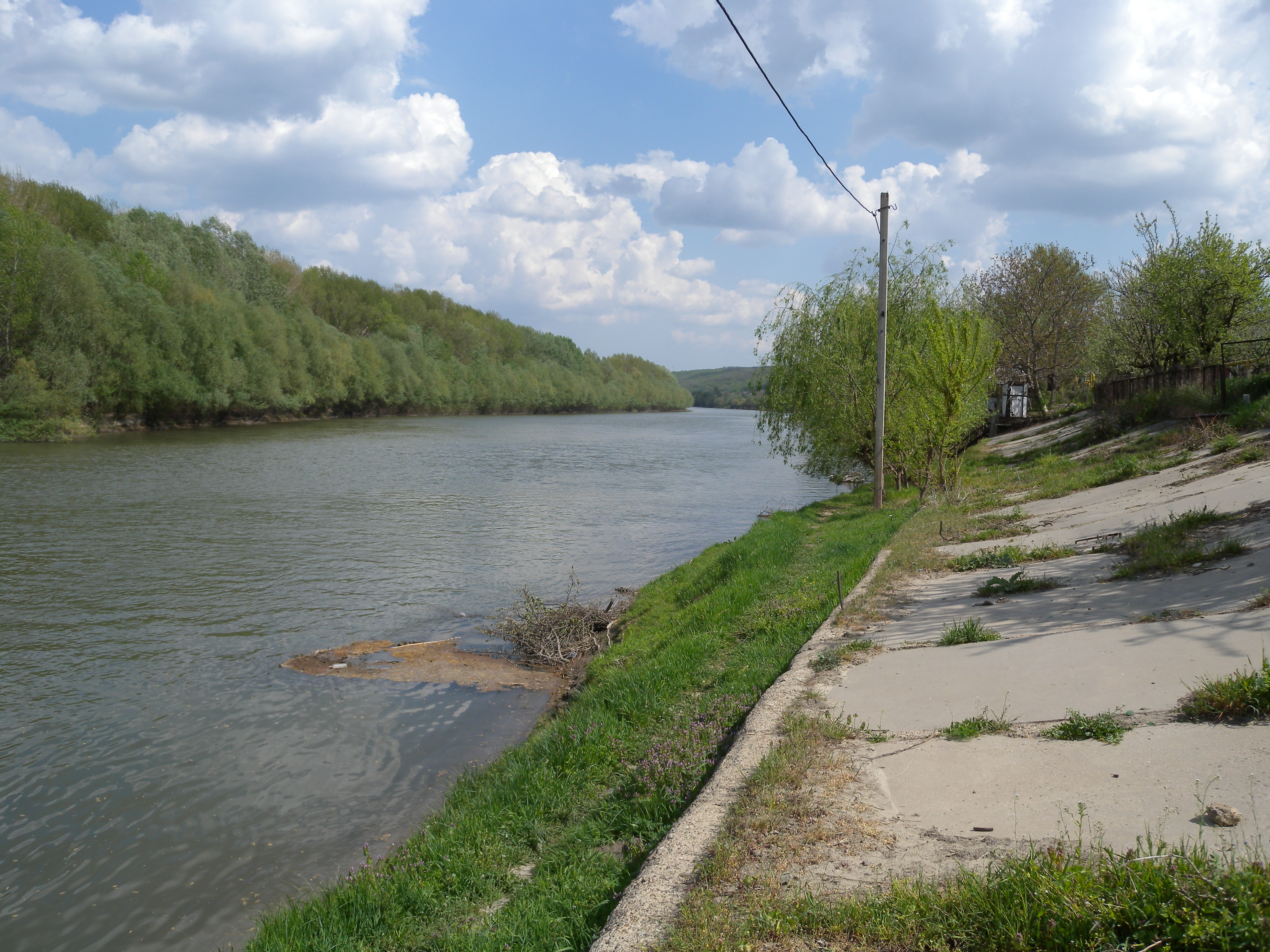 Нижній Дністер (№ 1316 в Рамсарському списку). Каушенський район, Штефан-Водський район, Придністров'я (код MD-SV-zu-002)